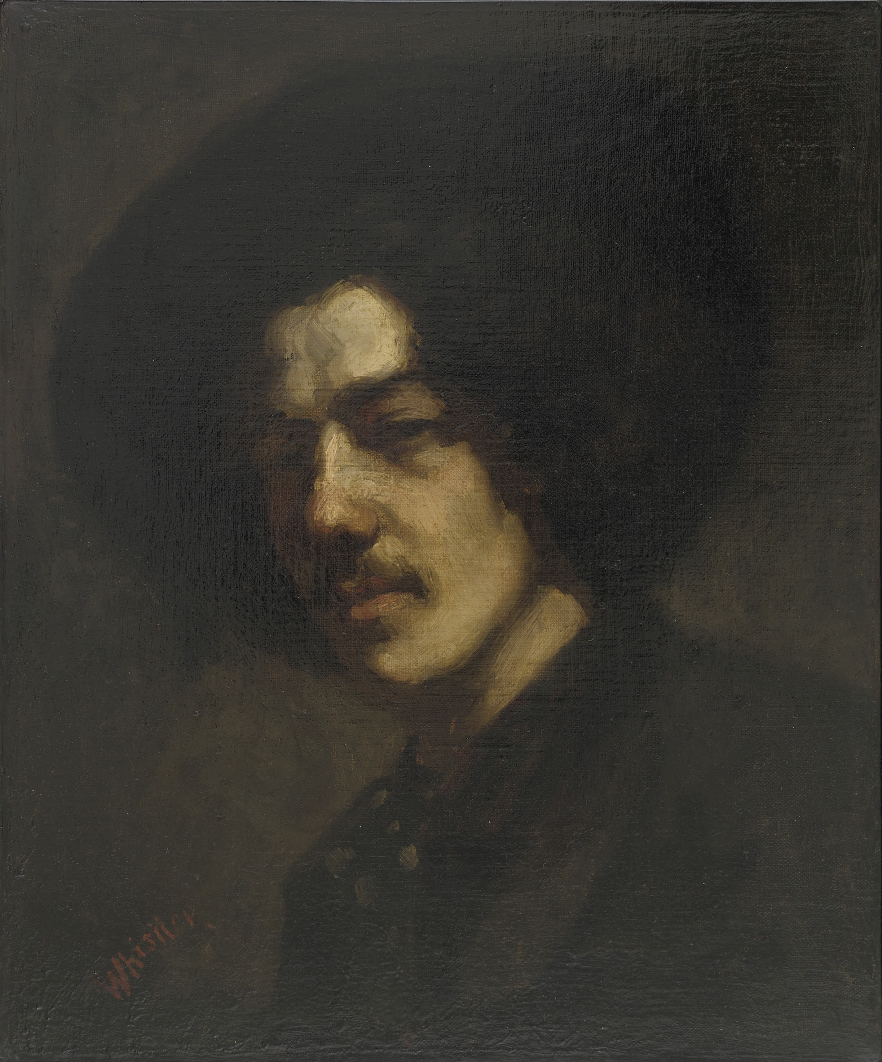 Self-portrait